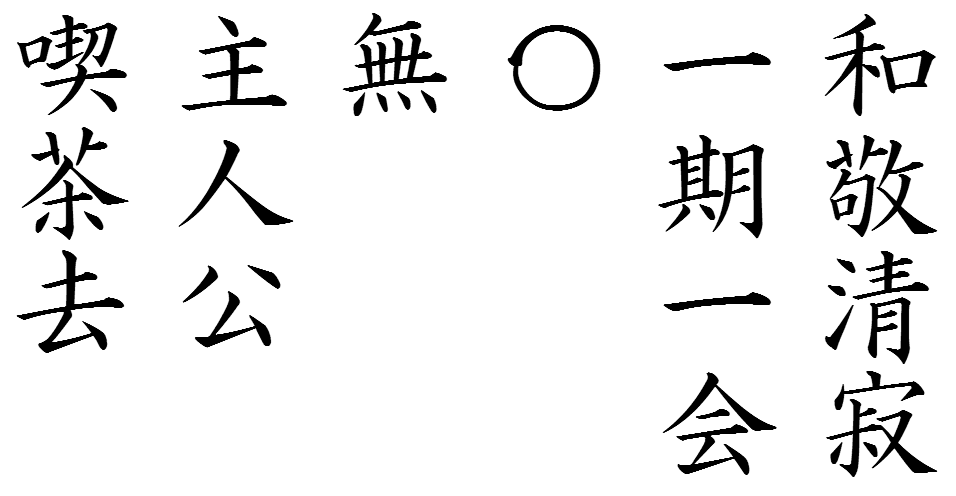 Expresii care apar adesea pe kakemono, la ceremonia ceaiului. De la dreapta (!) la stînga: 和敬清寂: wakeiseijaku 一期一会: ichigoichie 〇: en 無: mu 主人公: shujinkou 喫茶去: kitsusako Font: HG正楷書体-PRO